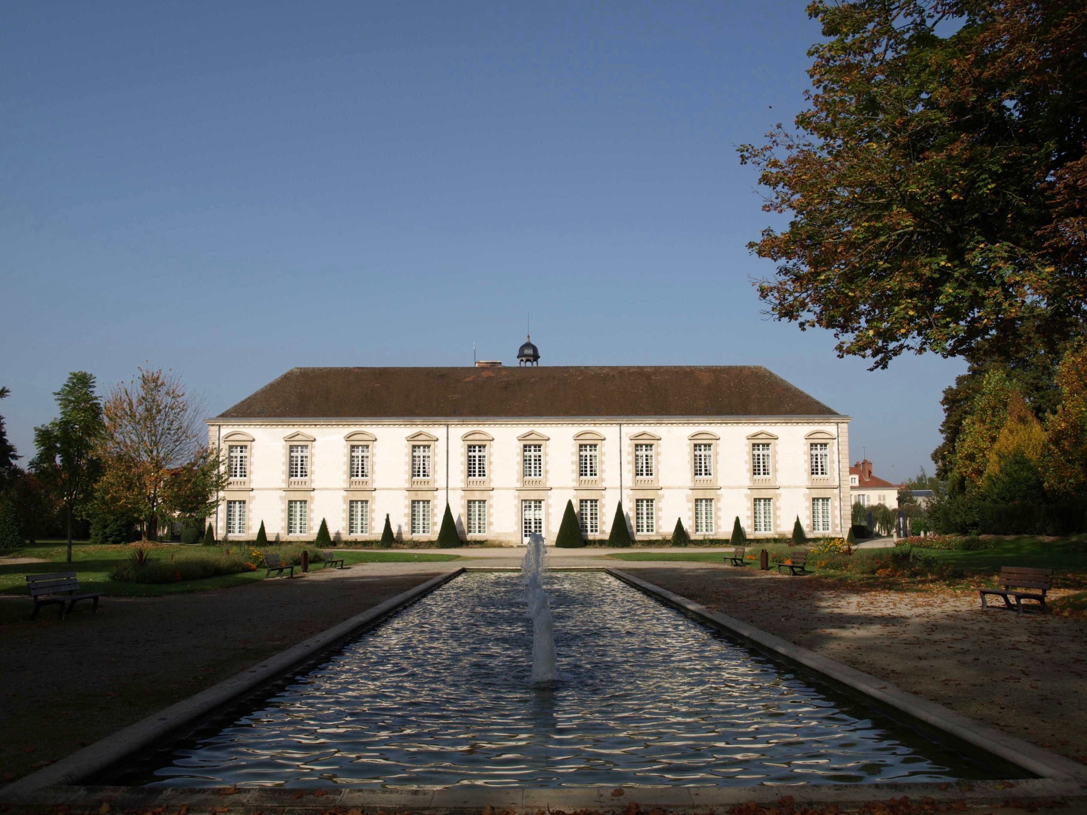 Vitry-le-François (51300 - FRANCE) : photographies Vitry-le-François (51300 - FRANCE) : Hôtel de ville (vue du parc et bassin)